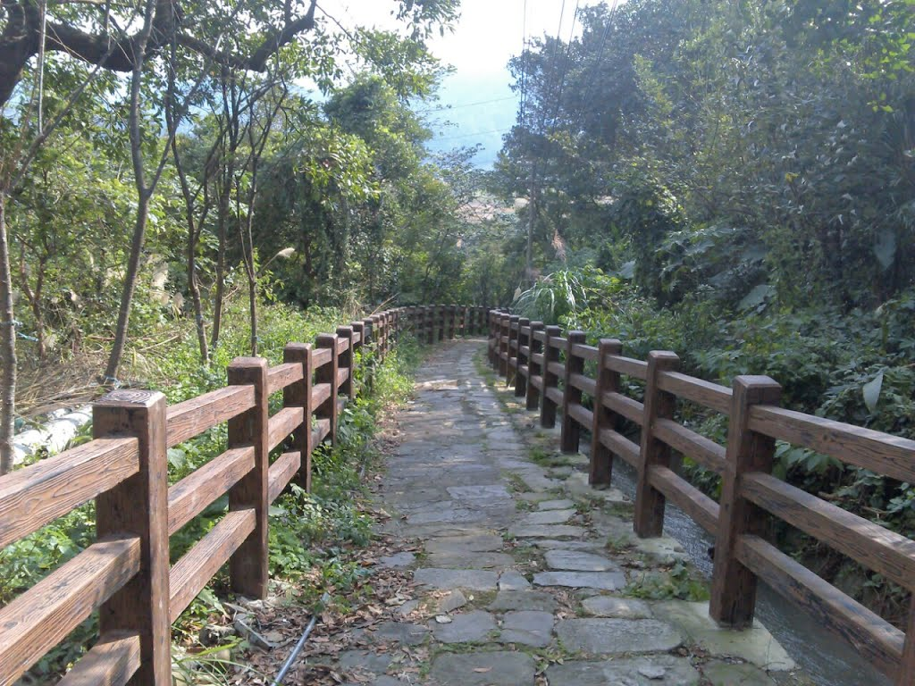 桃園縣龍潭鄉十一份挑擔古道為連接十一份與三坑子之間的通道。